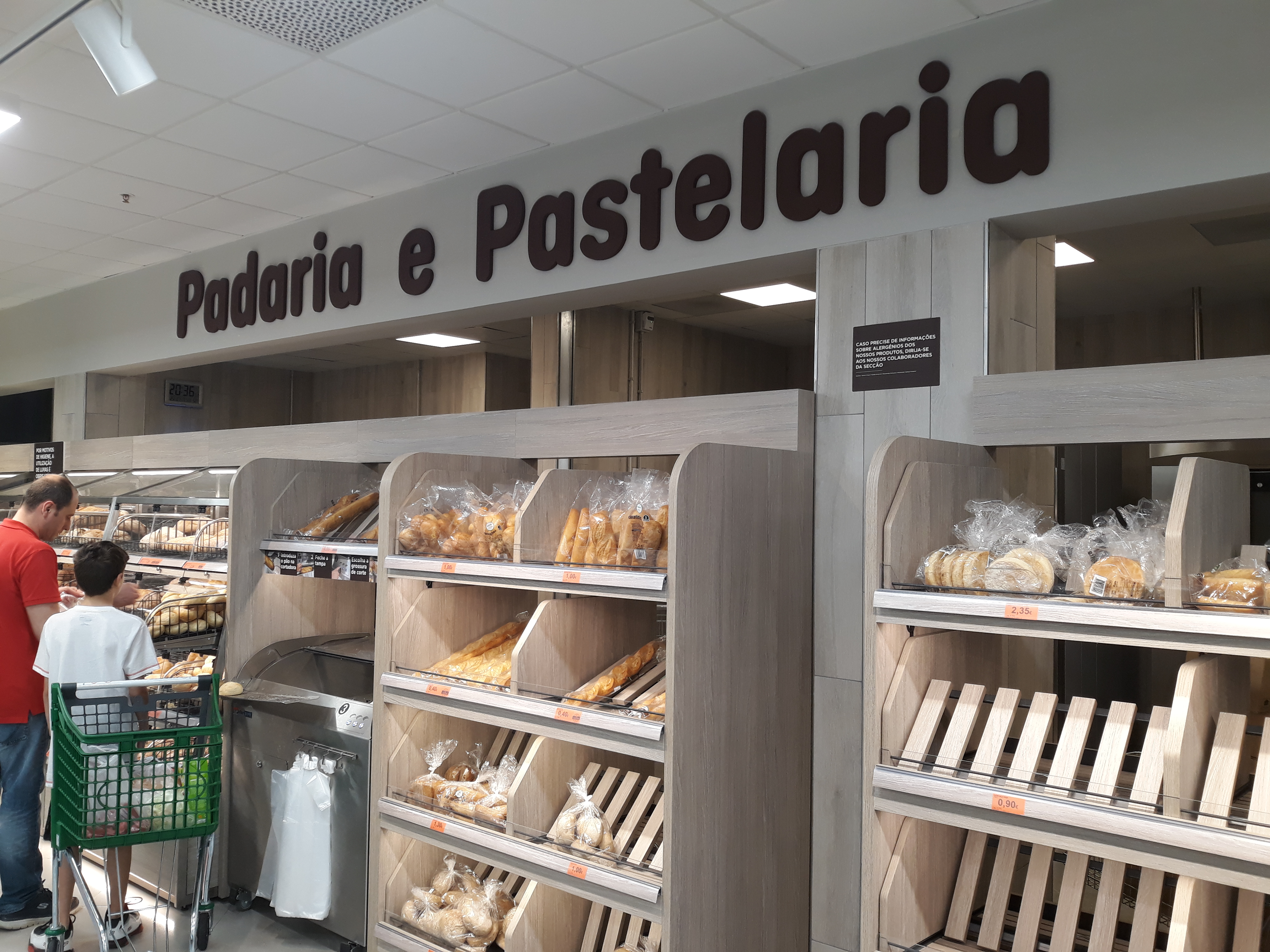 Eurovelo 1, Secció 15 a Portugal